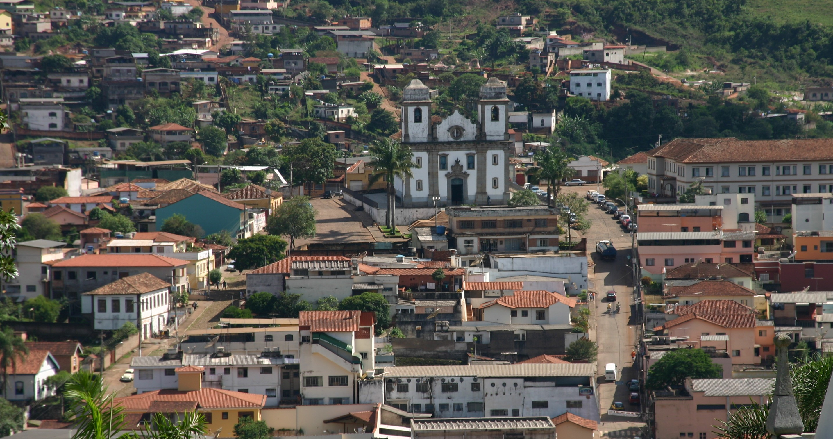 Congonhas , Minas Gerais, Brésil.